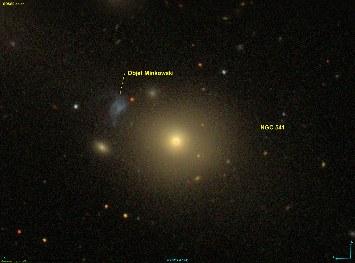 Image créée à l'aide du logiciel Aladin Sky Atlas du Centre de Données astronomiques de Strasbourg et des données publiques en format FIT de SDSS (Sloan Digital Sky Survey).